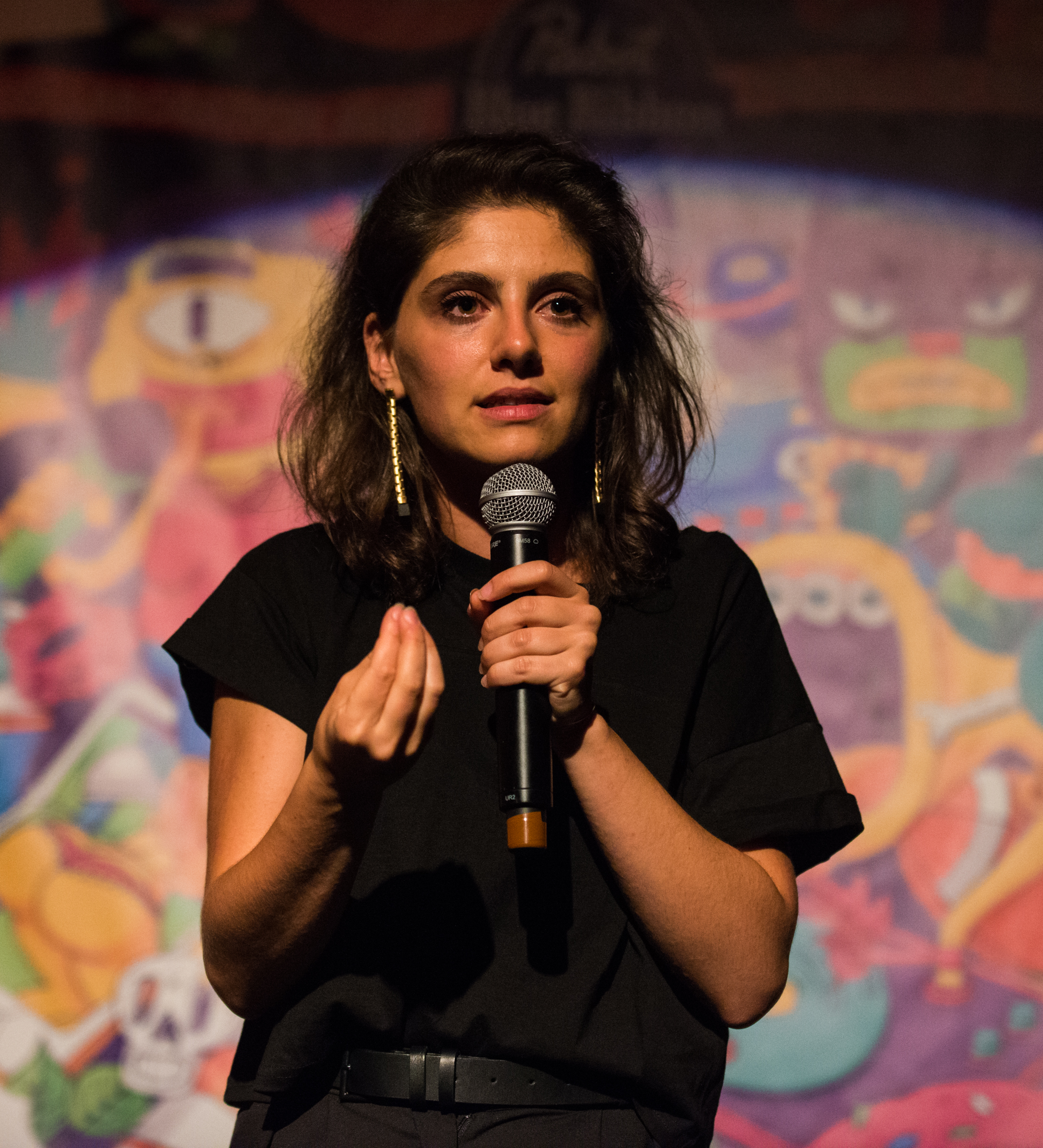 Marina-Rollman-20150710-023 Marina Rollman sur scène au festival Zoofest à Montréal en juillet 2015